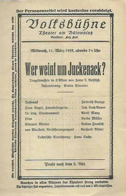 Programmheft zur Aufführung 'Wer weint um Juckenack?', Tragikomödie in 3 Akten in der Volksbühne, Theater am Bülowplatz, Berlin am 11. März 1925. Regie: Erwin Piscator. Mitwirkende: Heinrich George, Joh. Koch-Bauer, Adolf Manz, Gerda Müller, Gustav Froelich, Gerhard Ritter. Direktion: Fritz Holl